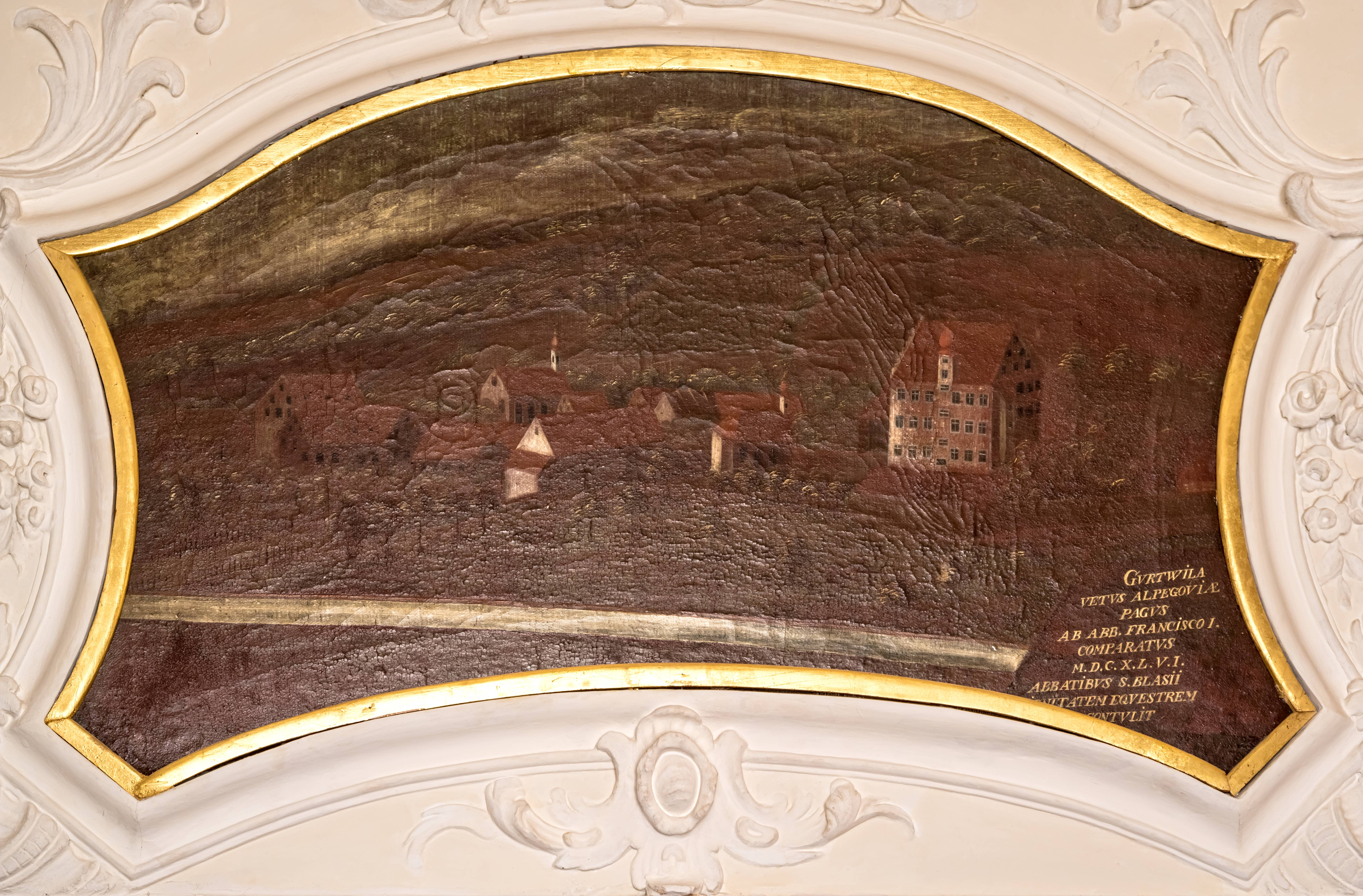 Bilder aus dem Schloß Bürgeln Hier Bilder von den Supraporten im ersten Stock des Schloßes. Es sind Bilder der Probsteien des Kloster St. Blasien und einige Füllbilder in einem später erstellten Flügel GVRTWILA VETVS ALPEGOLIAE PAGVS A B ABB. FRANCISCO I. COMPARATVS M.D.C.X.L.V.I. ABBATIBVS S. BLASII ...TATEM EQVESTREM ...NTVLIT